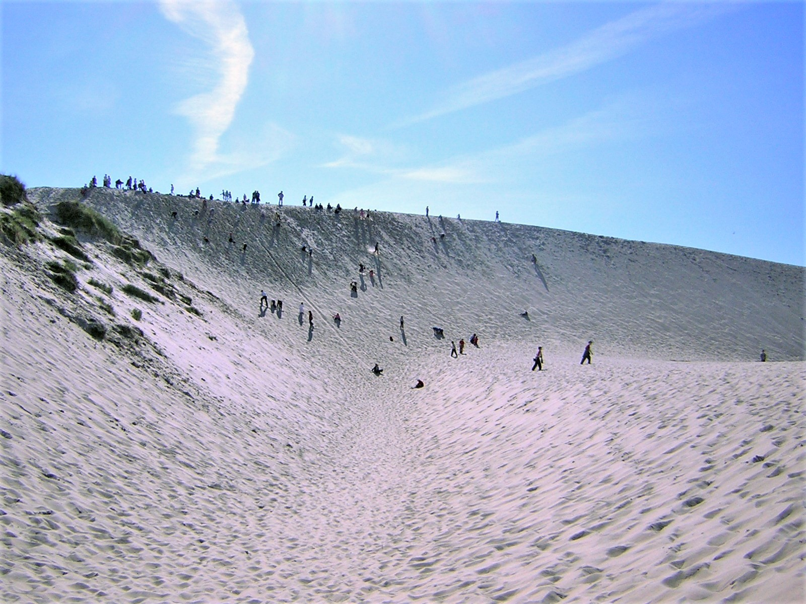 Wydmy w słowińskim Parku Narodowym. Łącka Góra. Autor: Marcin n MARCIN N 10:43, 8 June 2006 (UTC)